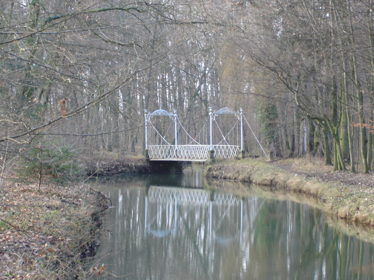 Le pont suspendu Pont de Veyle